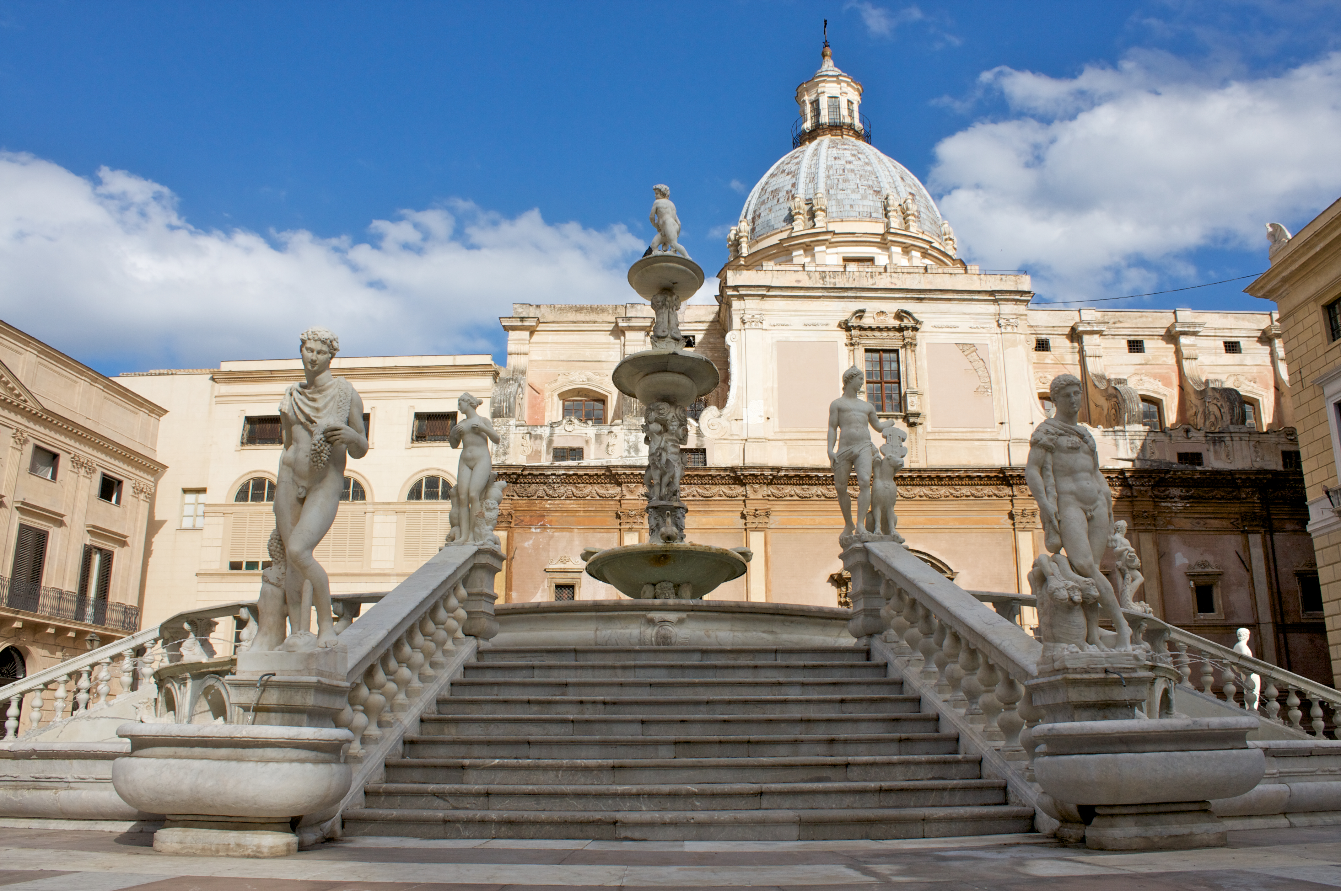 Piazza Pretoria, Palermo, Sicily